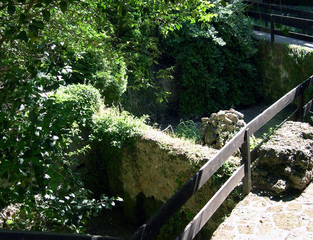 Vivarium (Viver) - detalle de los estanques de cria y engorde de peces en la época romana aprox. 200 a.C.